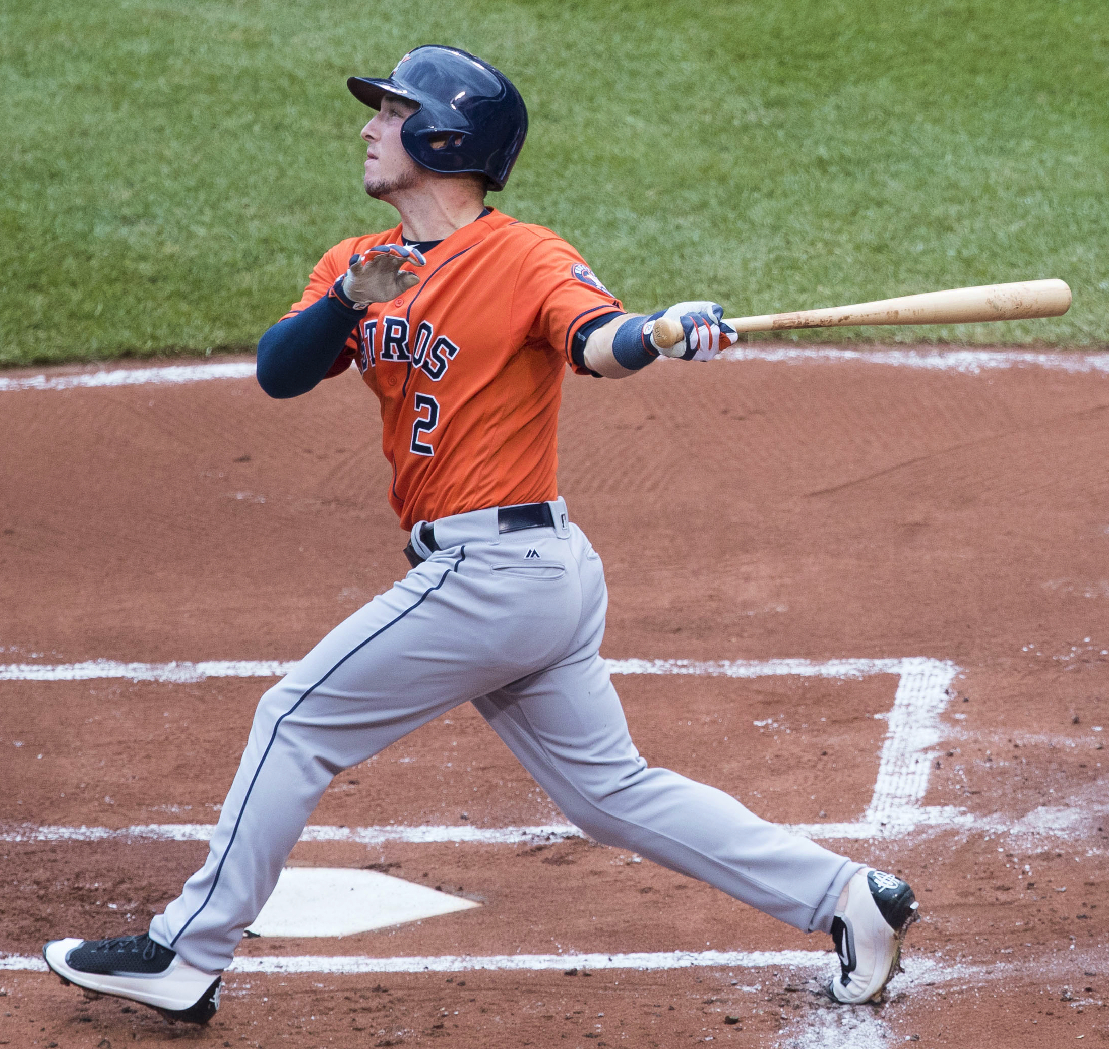 Alex Bregman